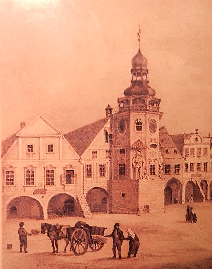 Ausschnitt aus einer Lithographie vom Arnauer Marktplatz um 1845